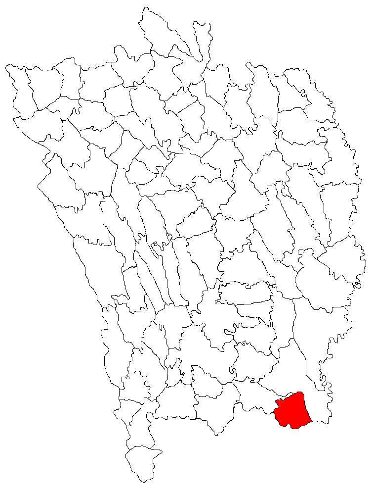 Categorie:Hărţi ale judeţului Vaslui